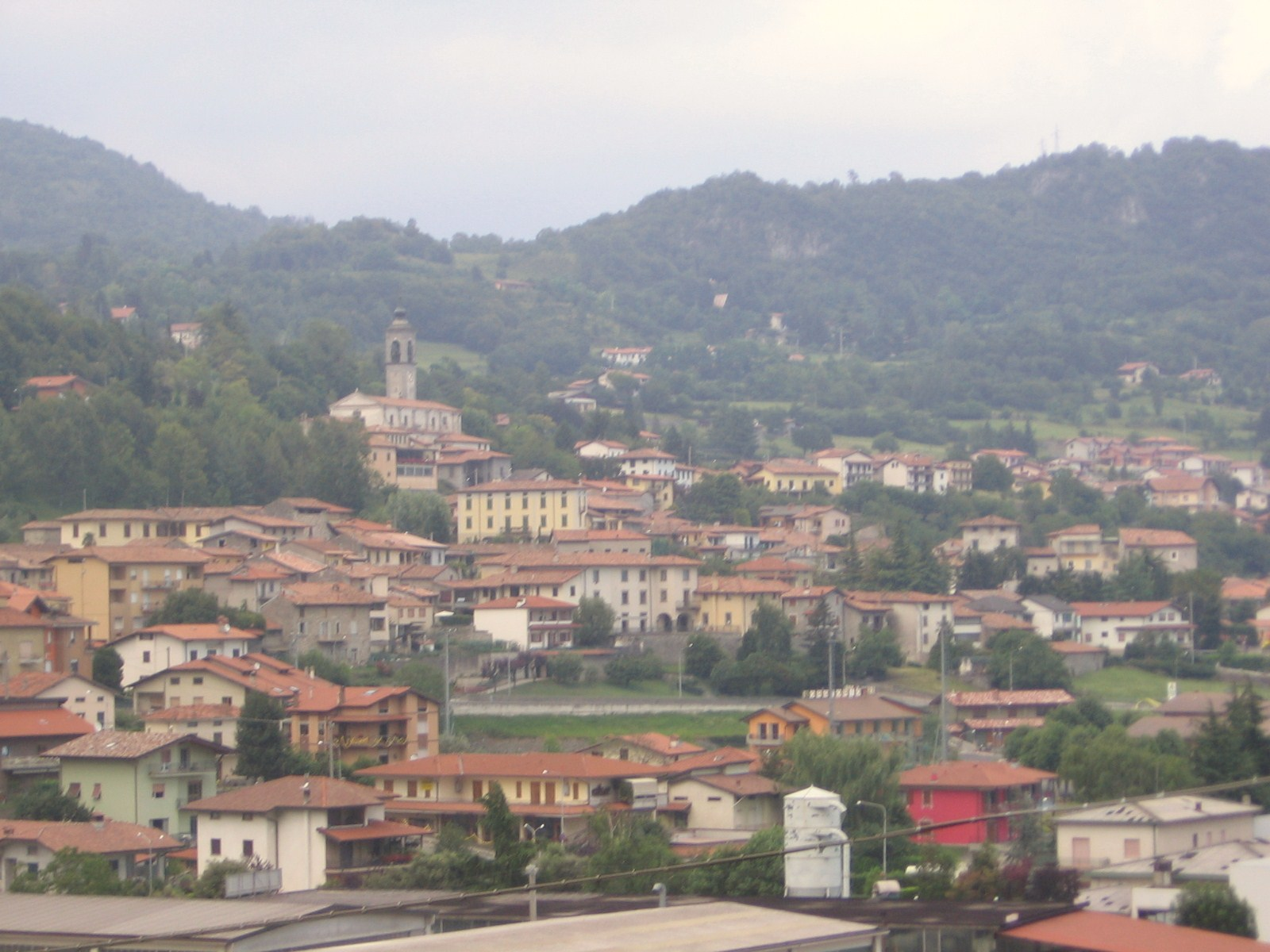 Solto Collina, Bergamo, Italia